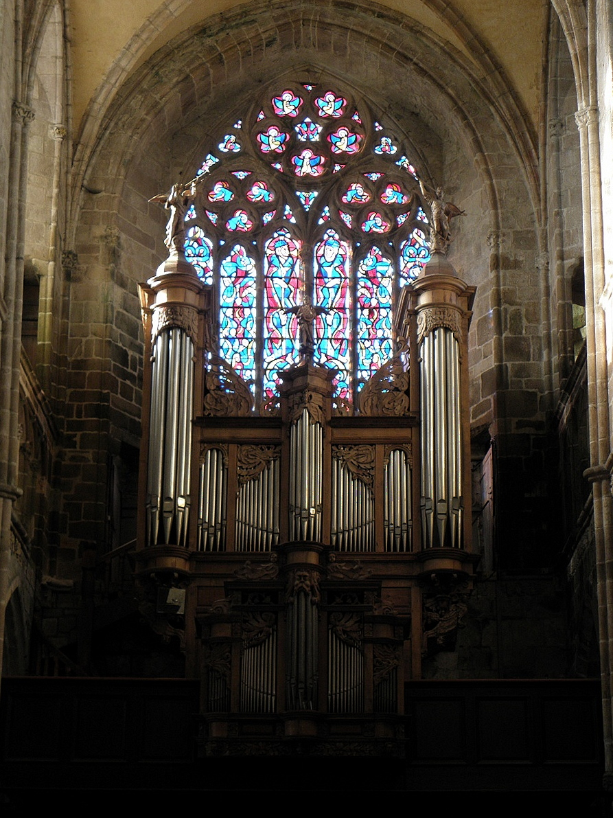 Grandes-Orgues de la cathédrale Saint-Tugdual de Tréguier (22).